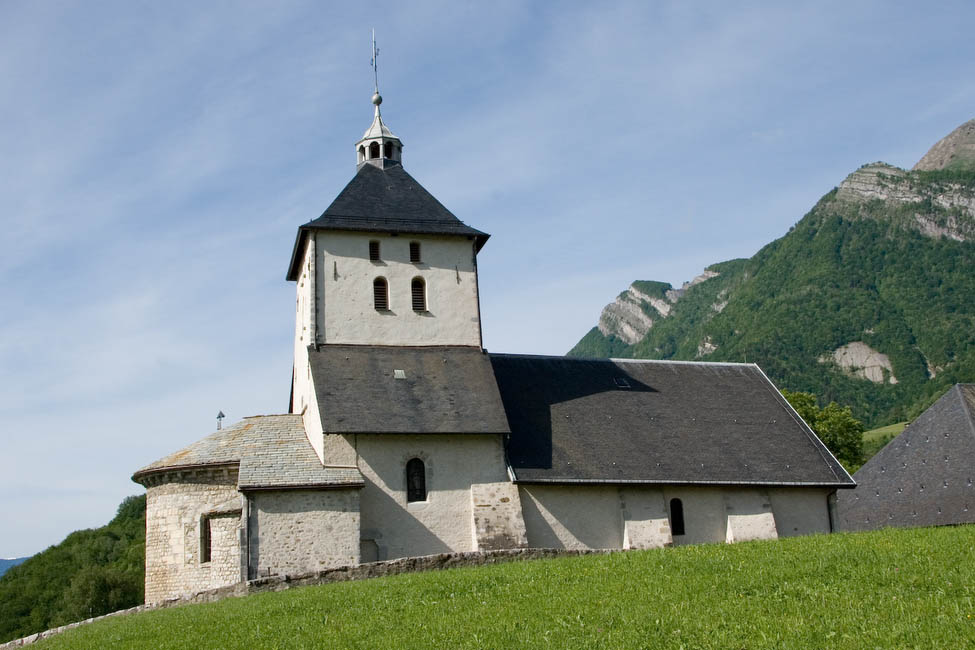 Eglise de Cléry